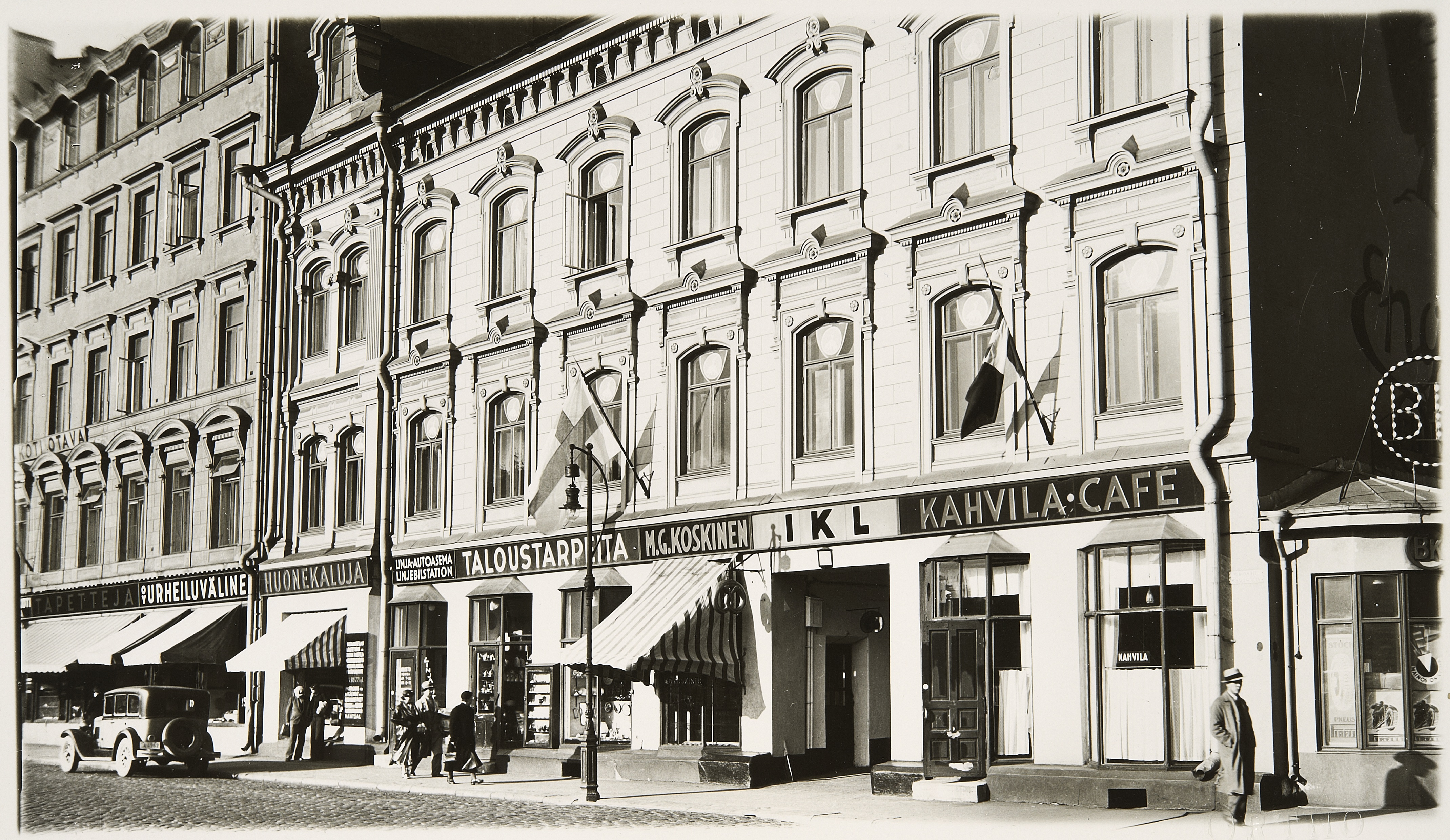 Isänmaallisen kansanliikkeen (IKL) keskustoimisto vuonna 1935, Mikonkatu 15, Helsinki